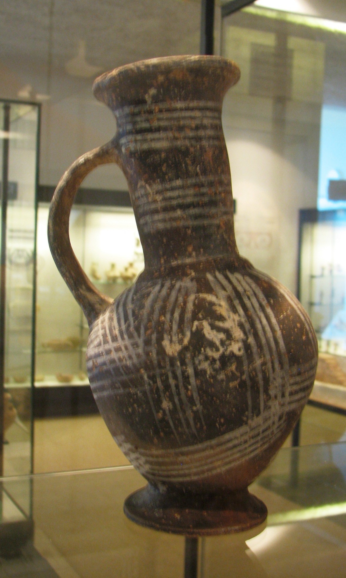 Late Bronze Period Pottery in Hecht Museum- Base Ring Ware כלים מתקופת הברונזה המאוחרת במוזיאון הכט באוניברסיטת חיפה פך "בילביל" מחופה שחור מעוטר בפסים לבנים ממשפחת כלי בסיס טבעת יבוא קיפרי